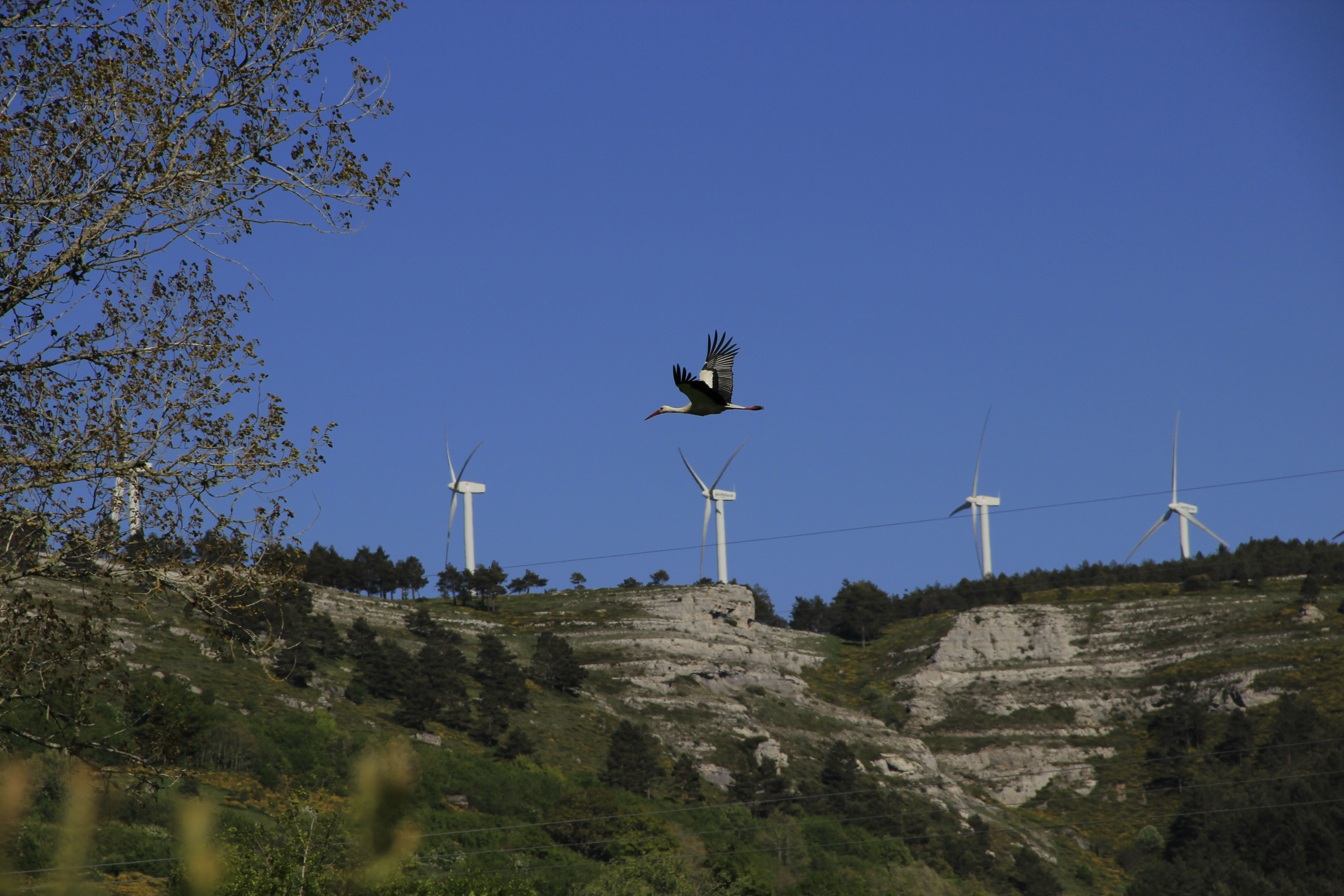 Cigüeña volando en Arnedo de Valdebezana